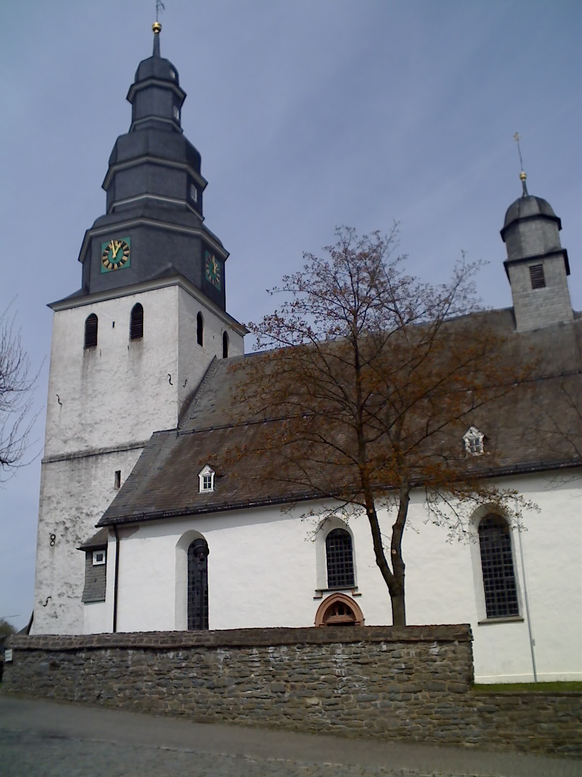 Pfarrkirche St. Heribert (Hallenberg, Hochsauerlandkreis)